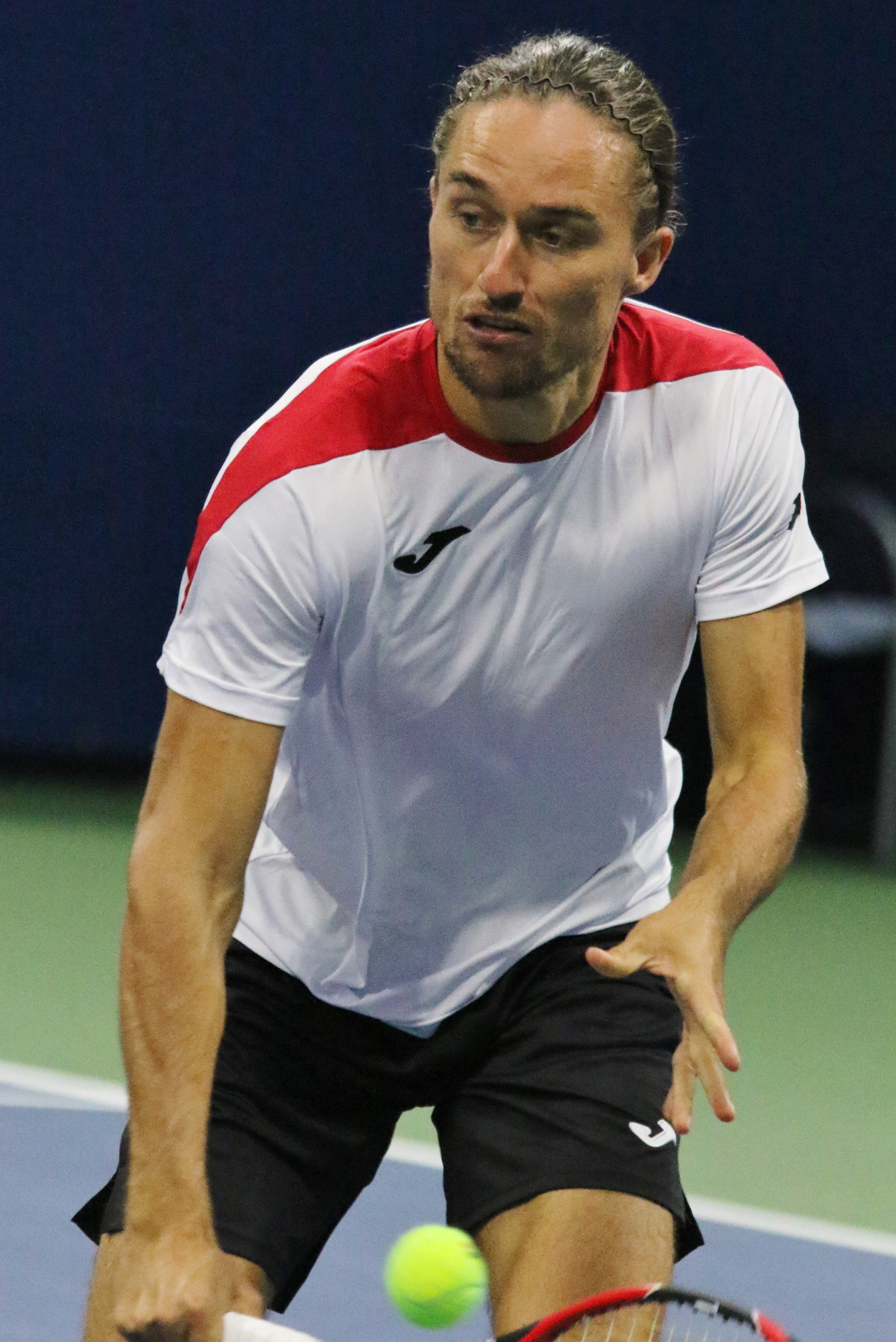 Dolgopolov US16 (7)